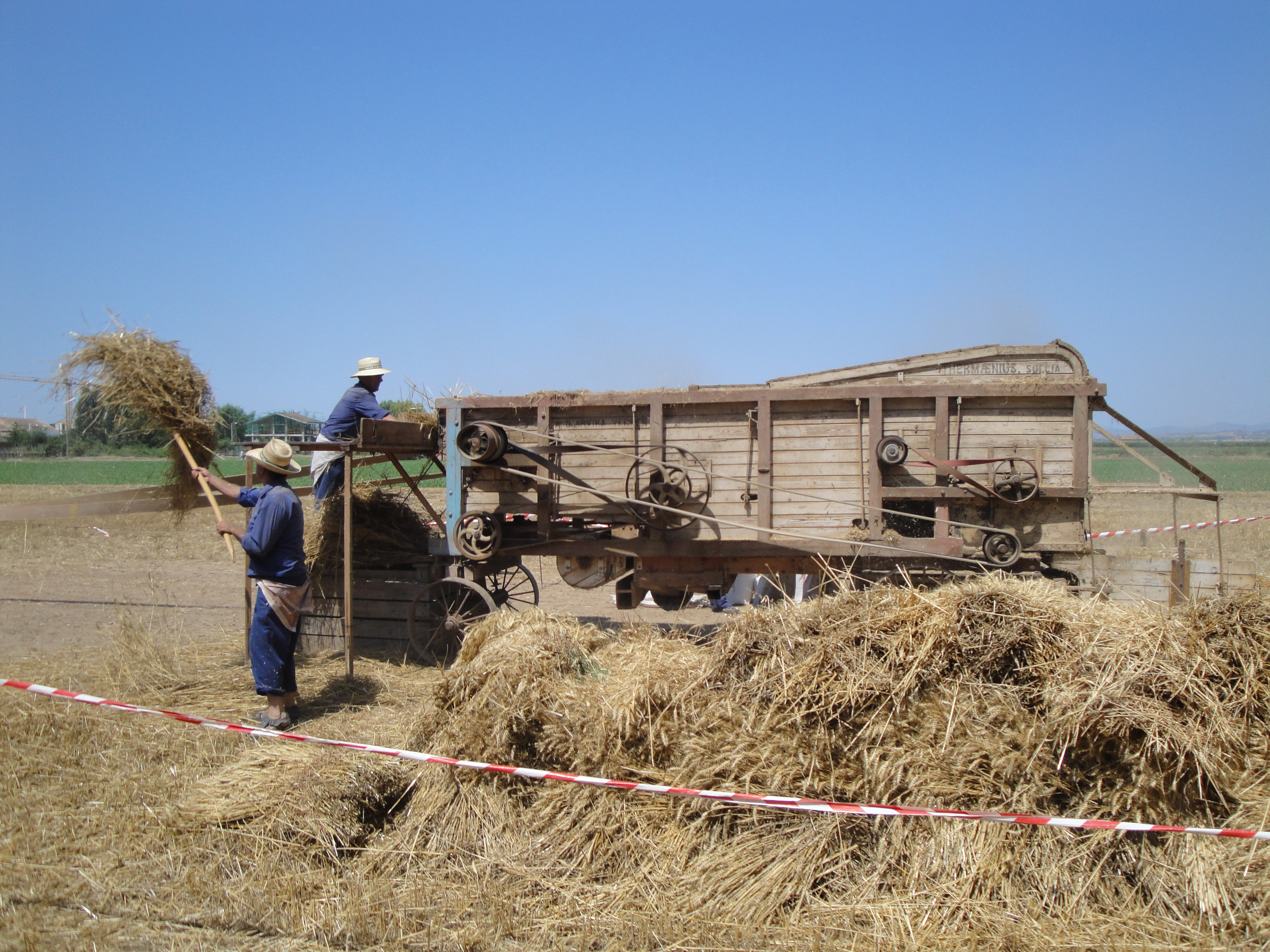 Batedora vella posada en funcionament.